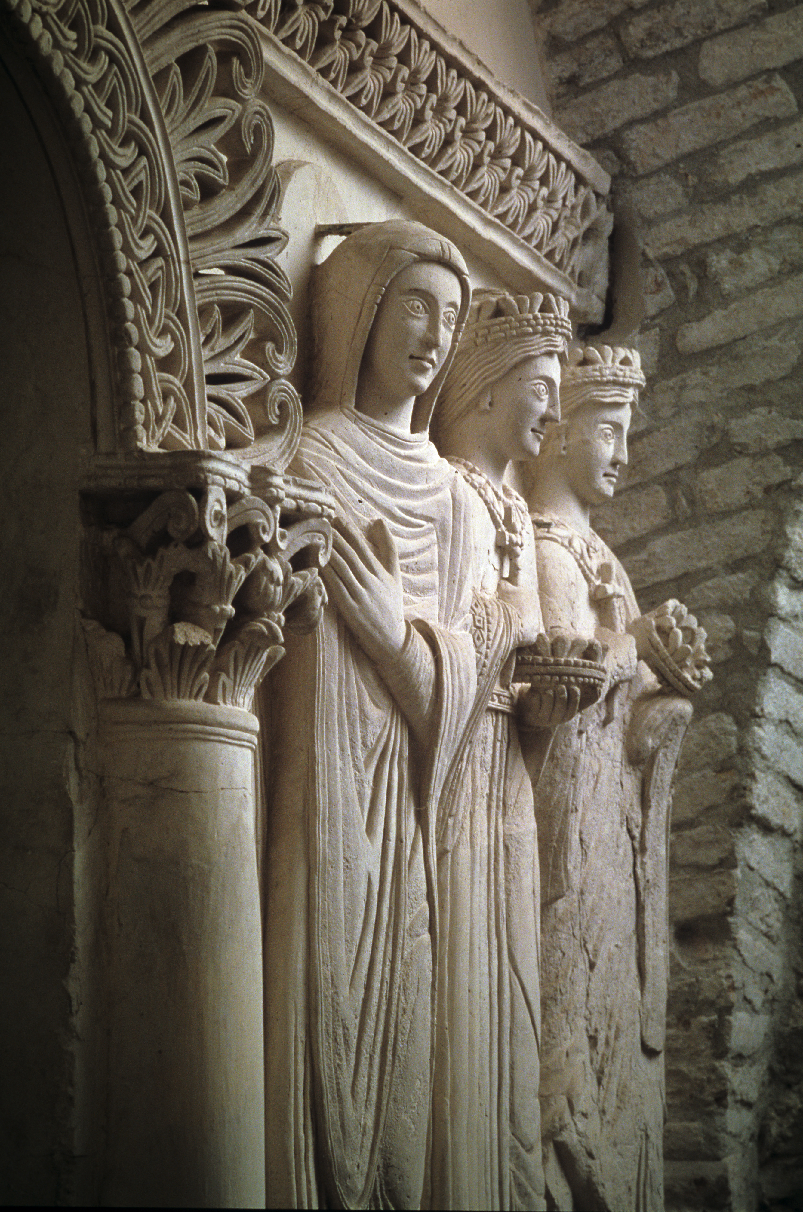 The so-called Tempietto Longobardo. Hall and counter-façade